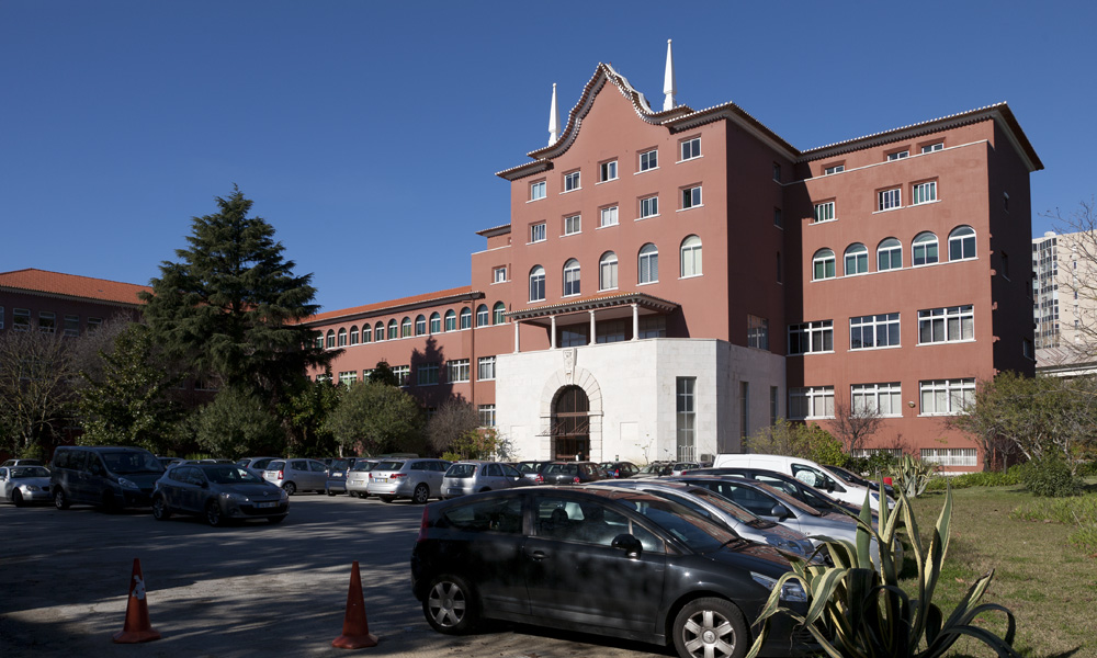 Colégio de Santa Doroteia; Arq. Jorge Segurado